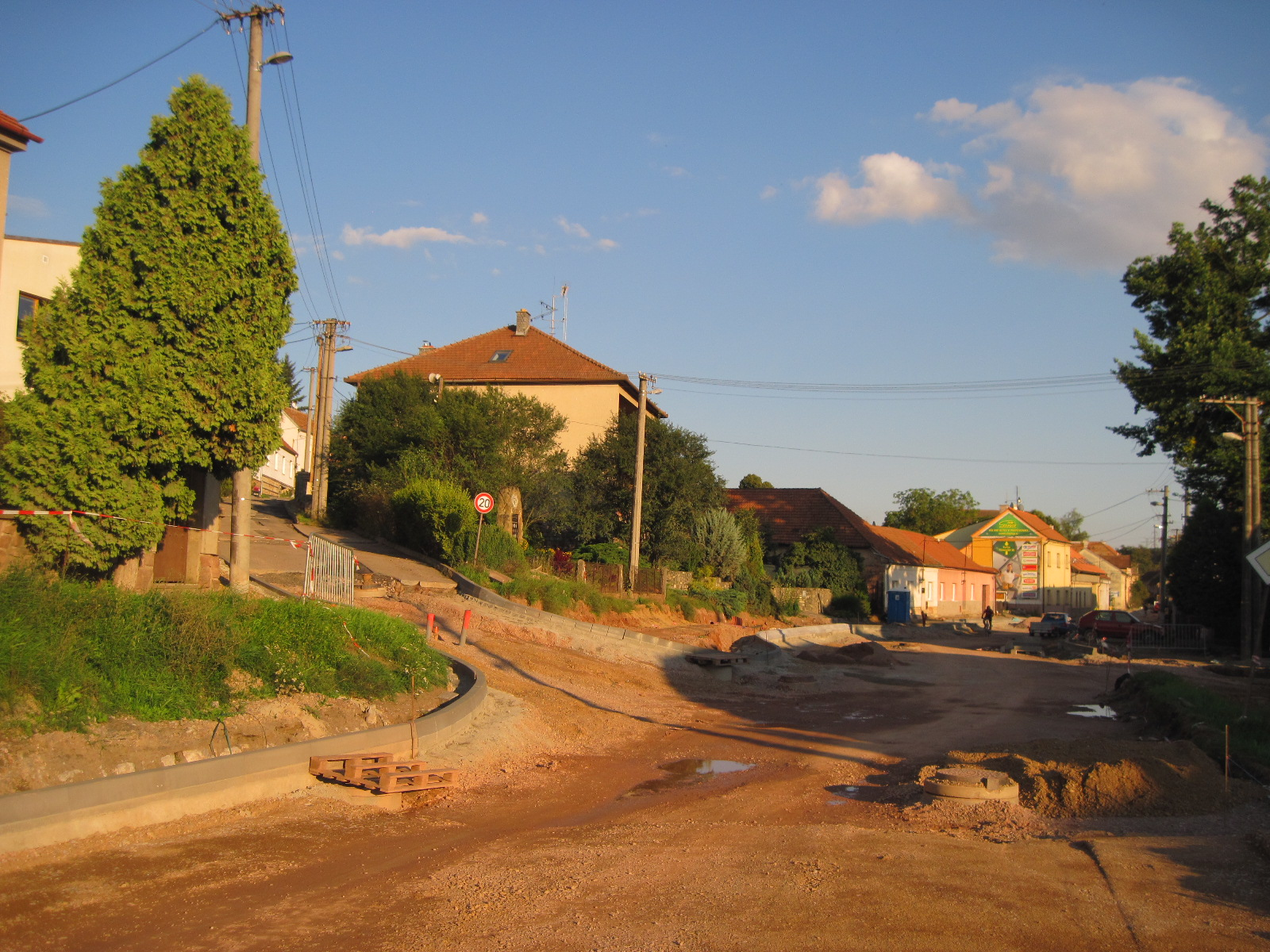 Hradčany u Tišnova - ulice